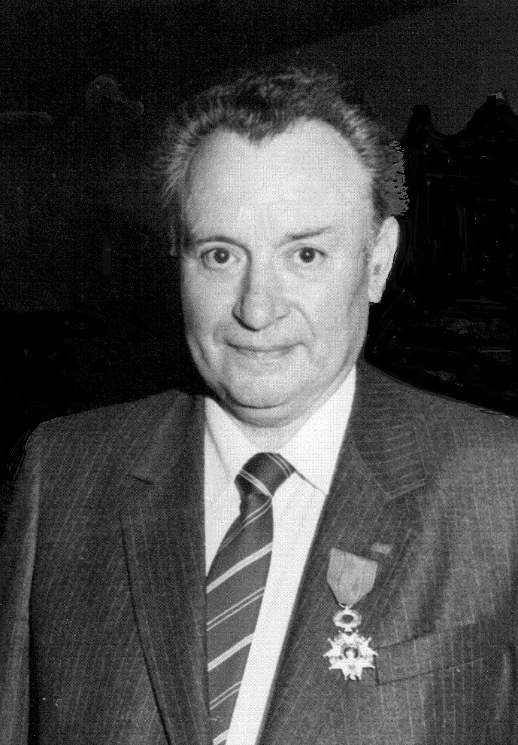 Portrait de Maître Guy Fournet, président de la Fédération sportive et culturelle de France (Archives fédérales)